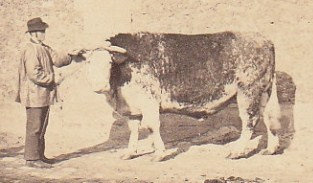 Portrait de Charmant, Bœuf Gras parisien.